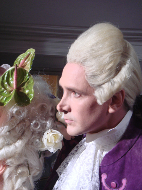 Laurent Caille jouant le rôle d'un perruquier de l'ancien régime